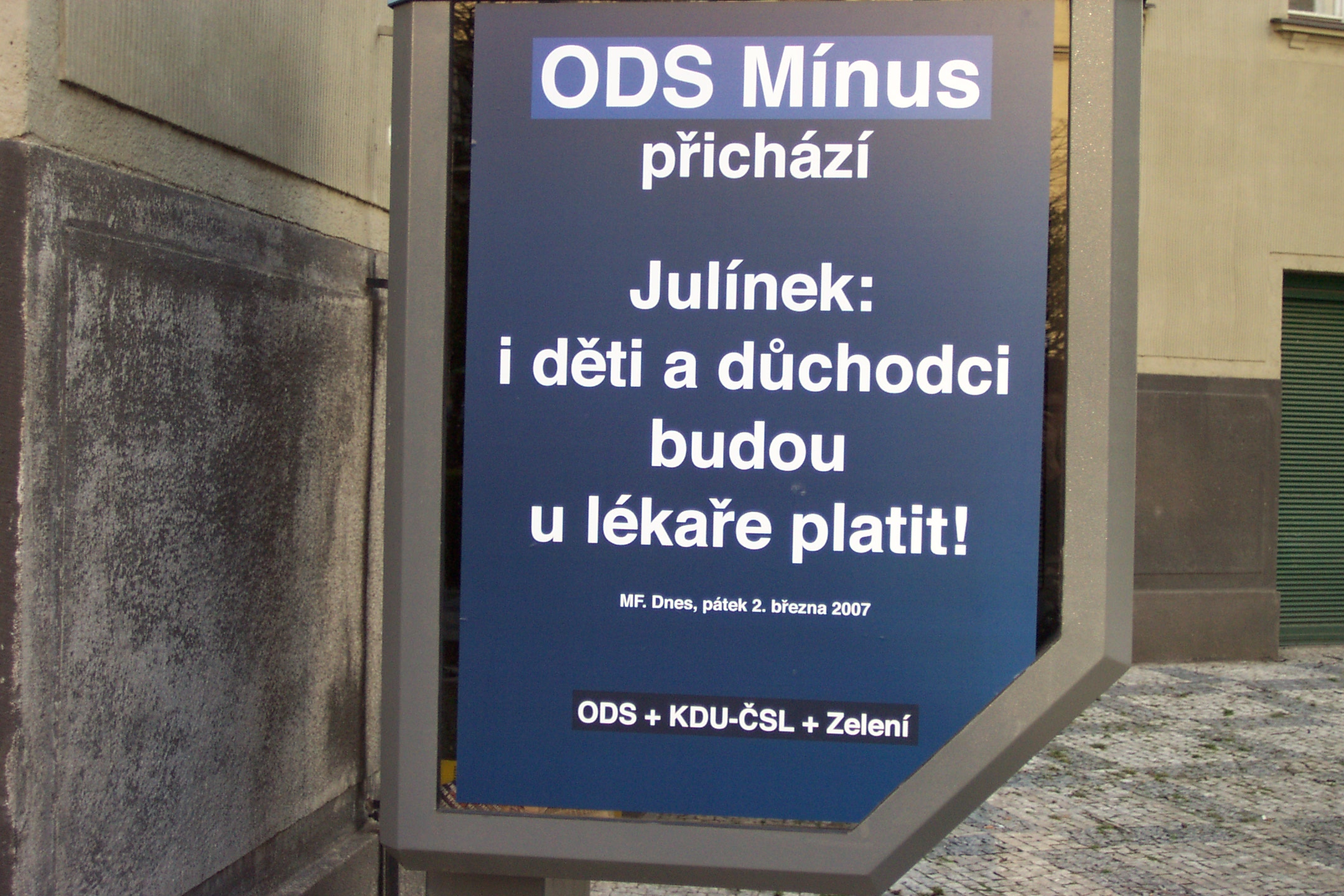 ODS Minus advertisement - ODS minus reklama proti vládě